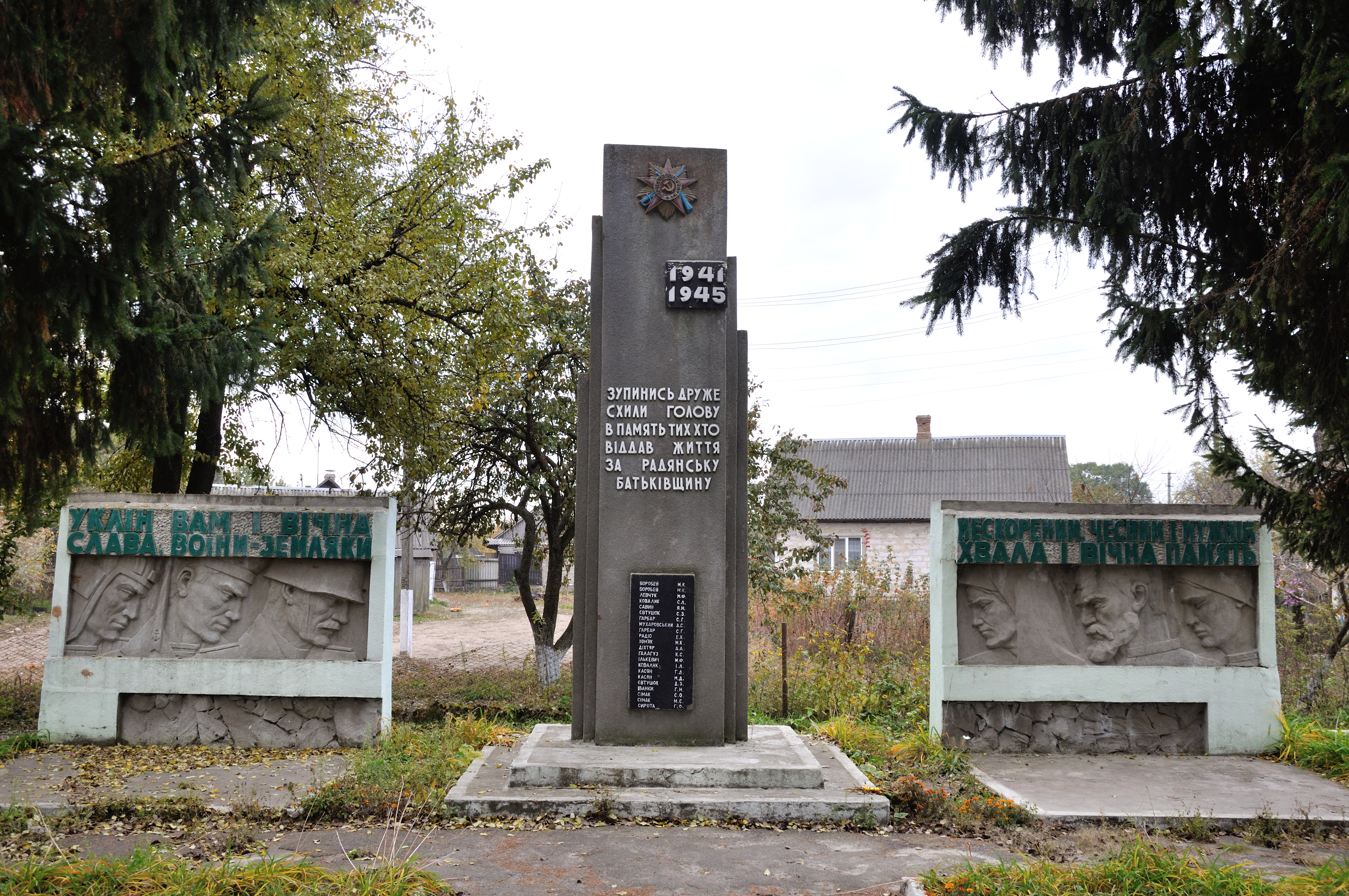 Пам’ятник воїнам-односельчанам, с. Зірне